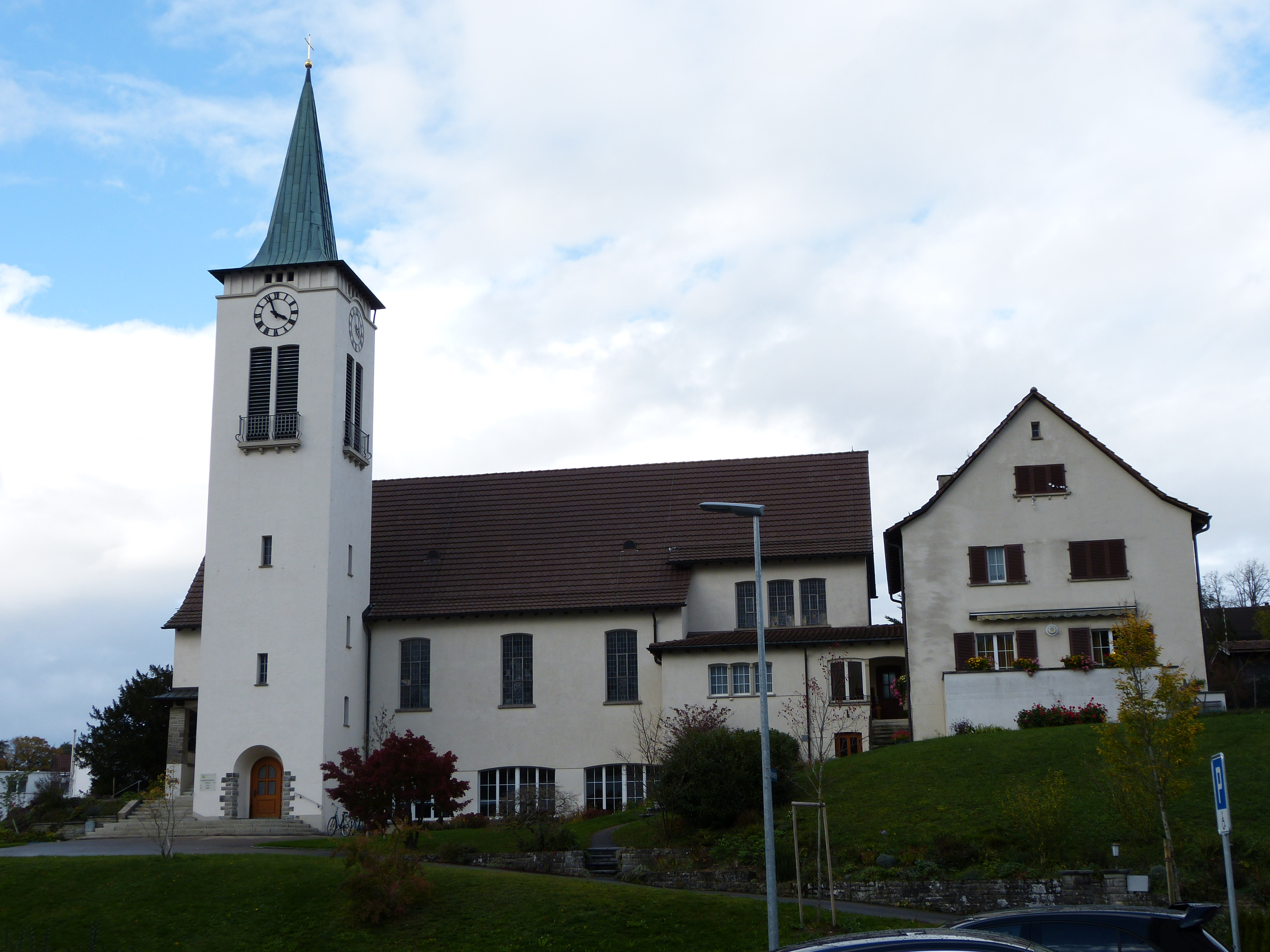 Katholische Kirche Bruder Klaus mit Pfarrhaus